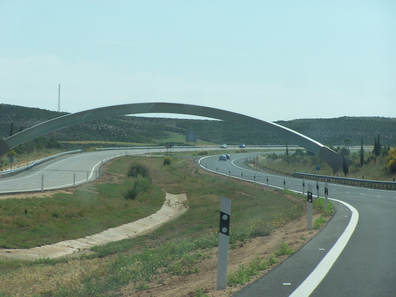 Arco que representa el meridiano de Greenwich y está colocado en la AP-2 (Aragón, España).